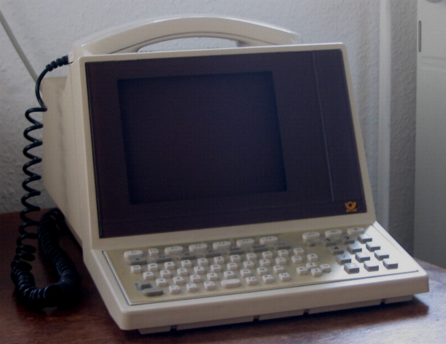 Eine Kombination aus Telefon und BTX-Terminal, das so genannte "Multifunktionale Telefon 12"